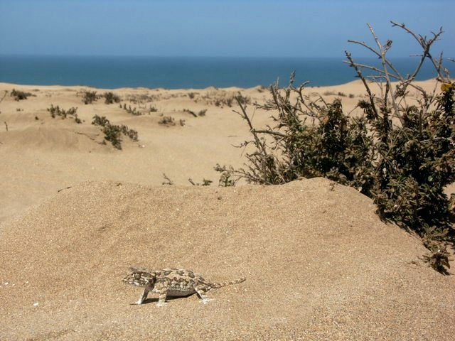 Tarentola chazaliae